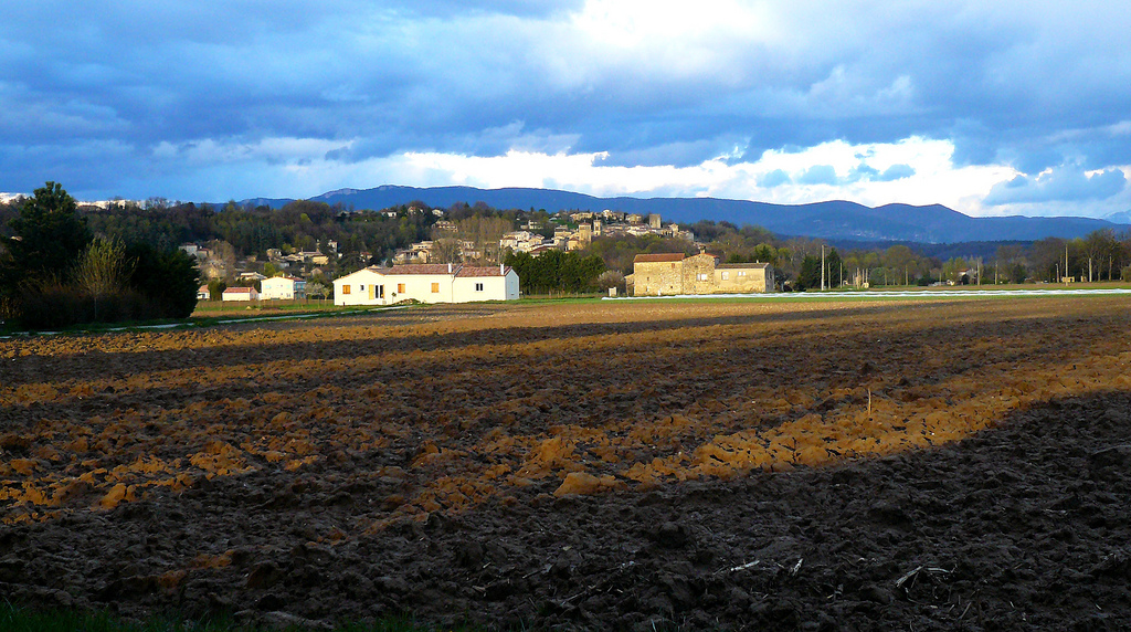 Lumière du soir